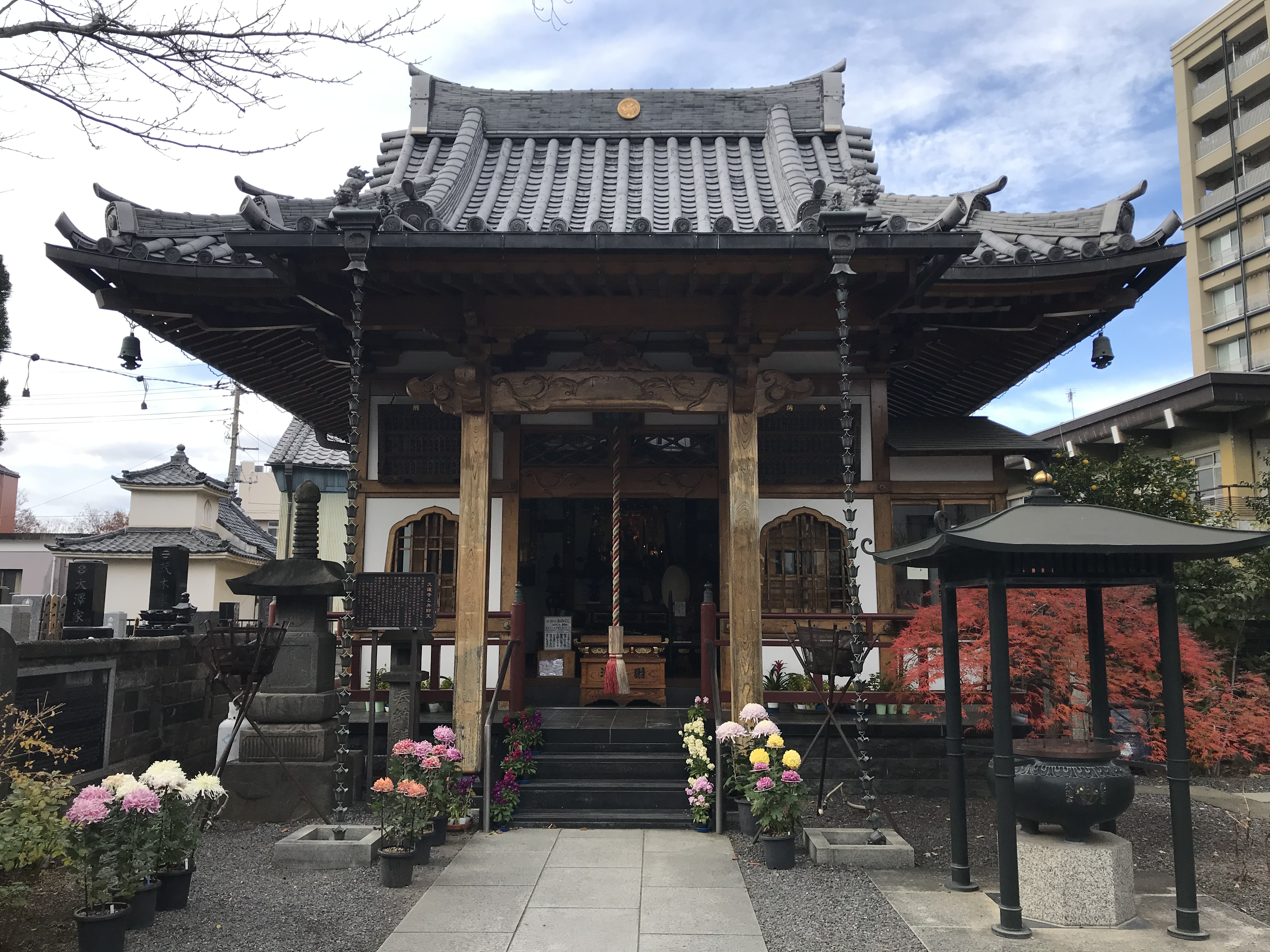 群馬県前橋市にある虎淵山宝池院大蓮寺